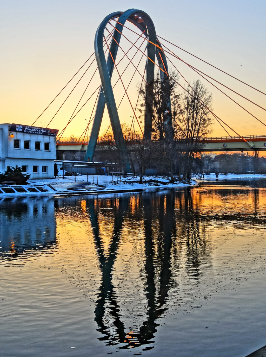 Trasa Uniwersytecka nad Brdą w Bydgoszczy